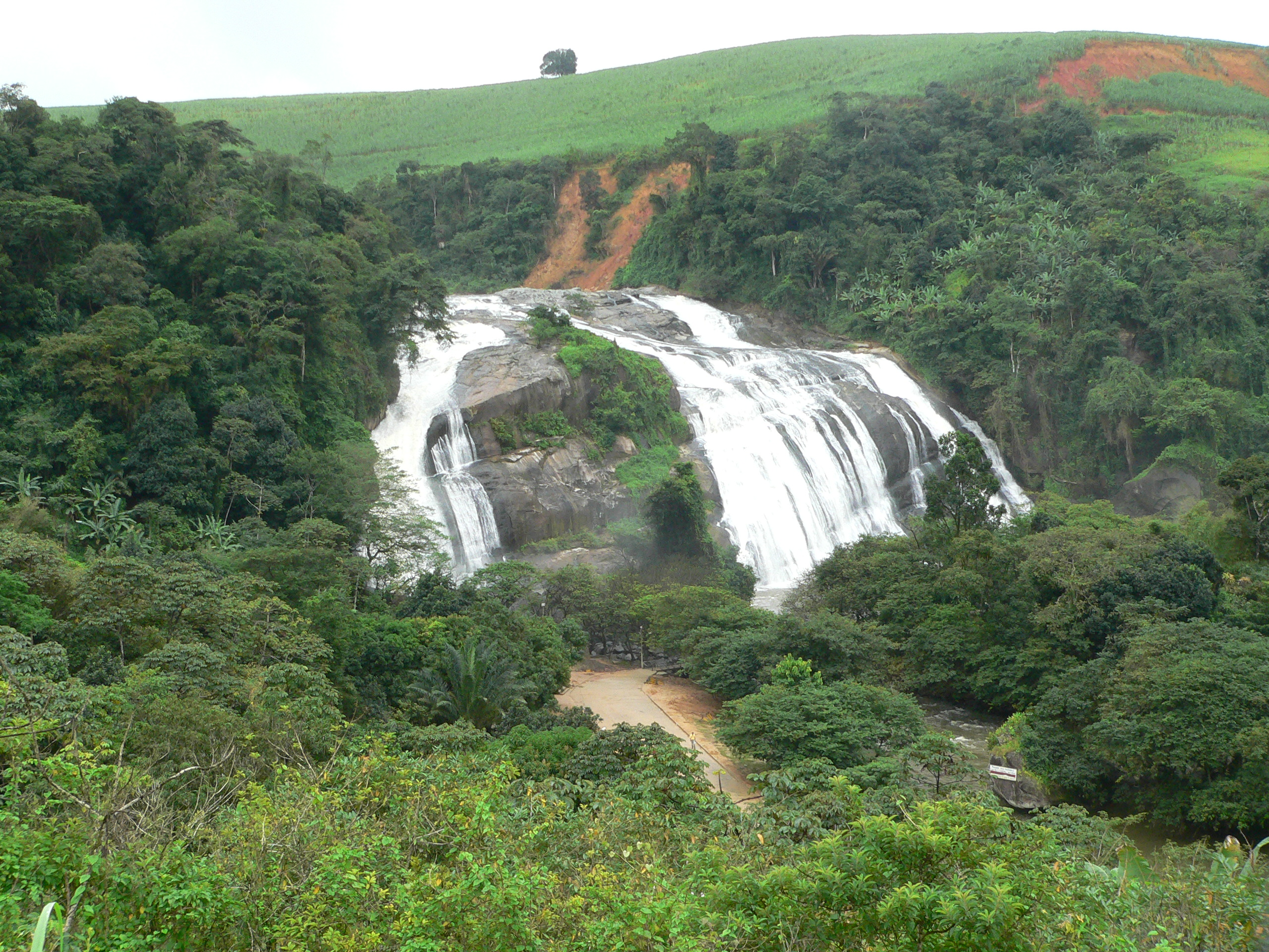 Cachoeira do Urubu localizada na cidade de Primavera - PE